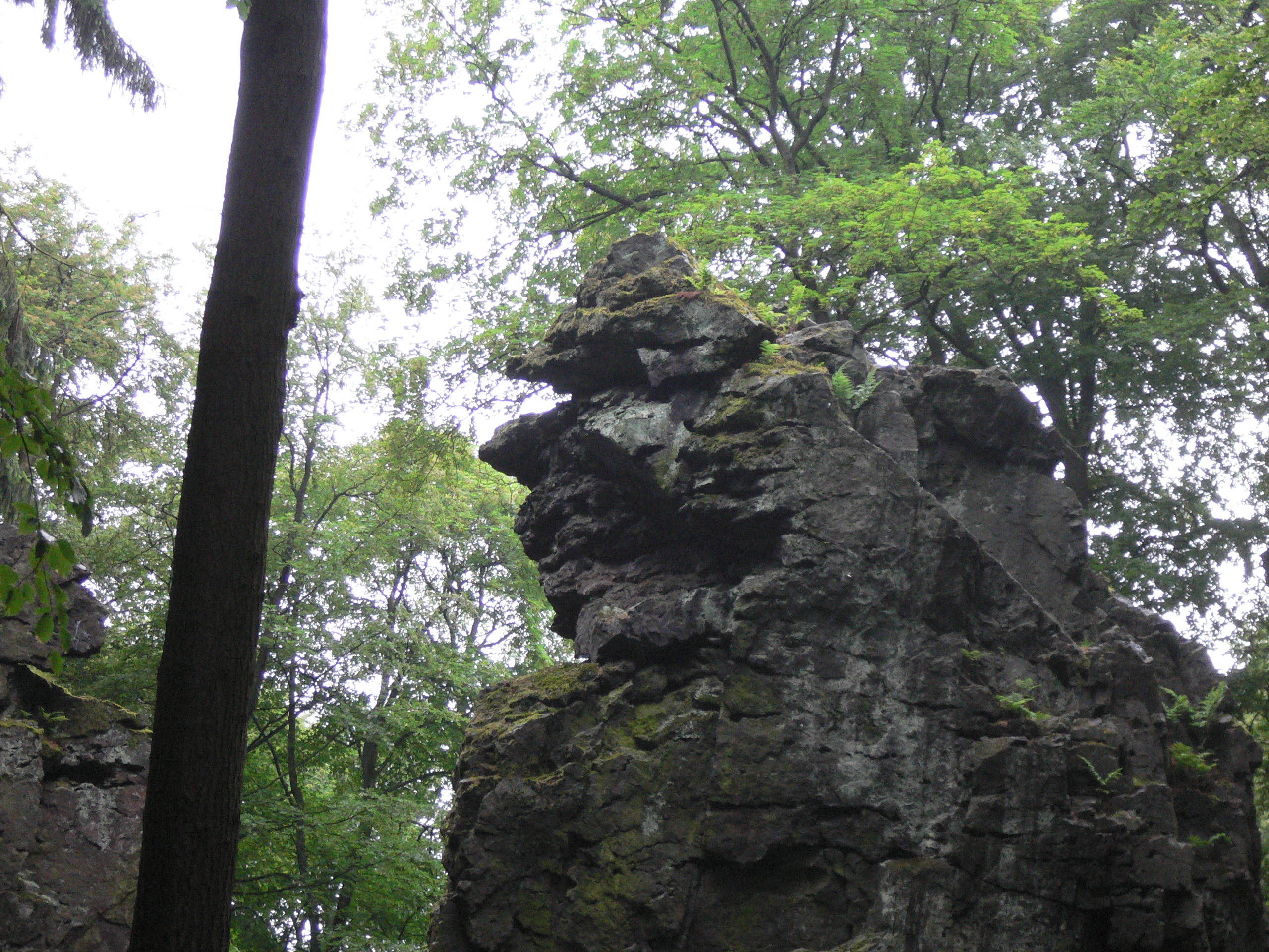 Wilhelmsteine, Detail des großen Gesichtsprofils